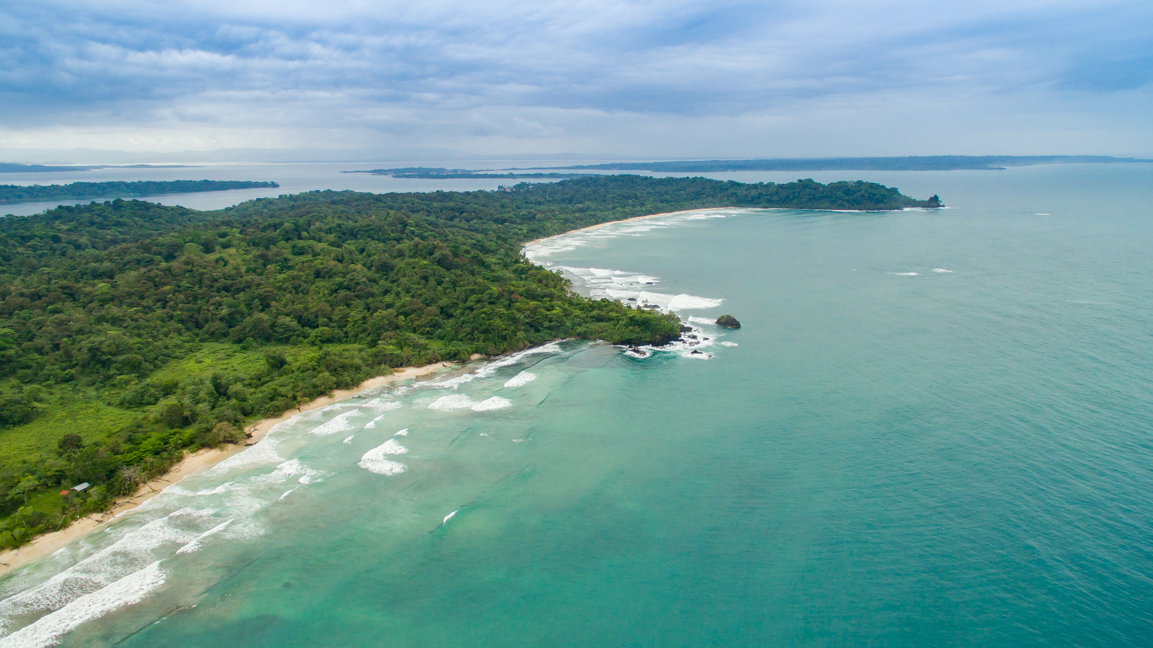 Der Red Frog Beach ist Teil des Isla Bastimentos National Marine Park.